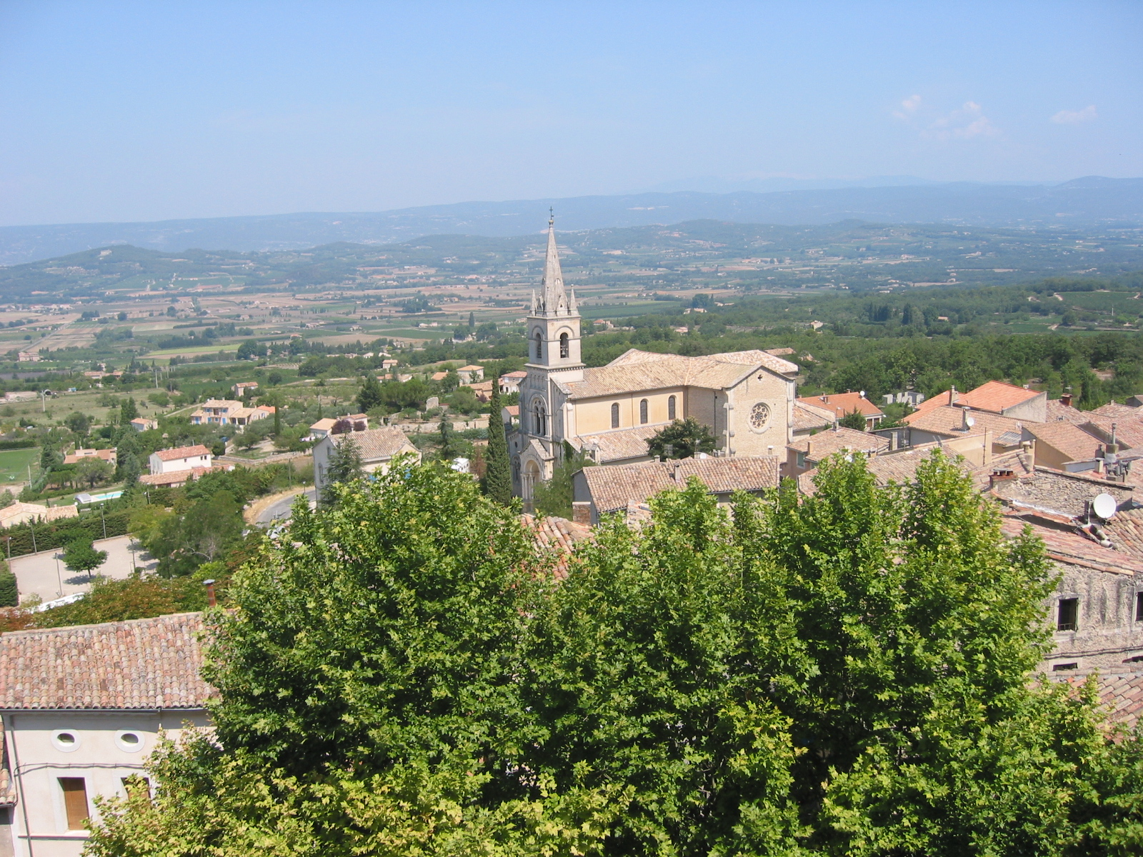 Bonnieux, Vaucluse, Luberon, France Photo prise le 26 juillet 2006 Aut : Jddmano